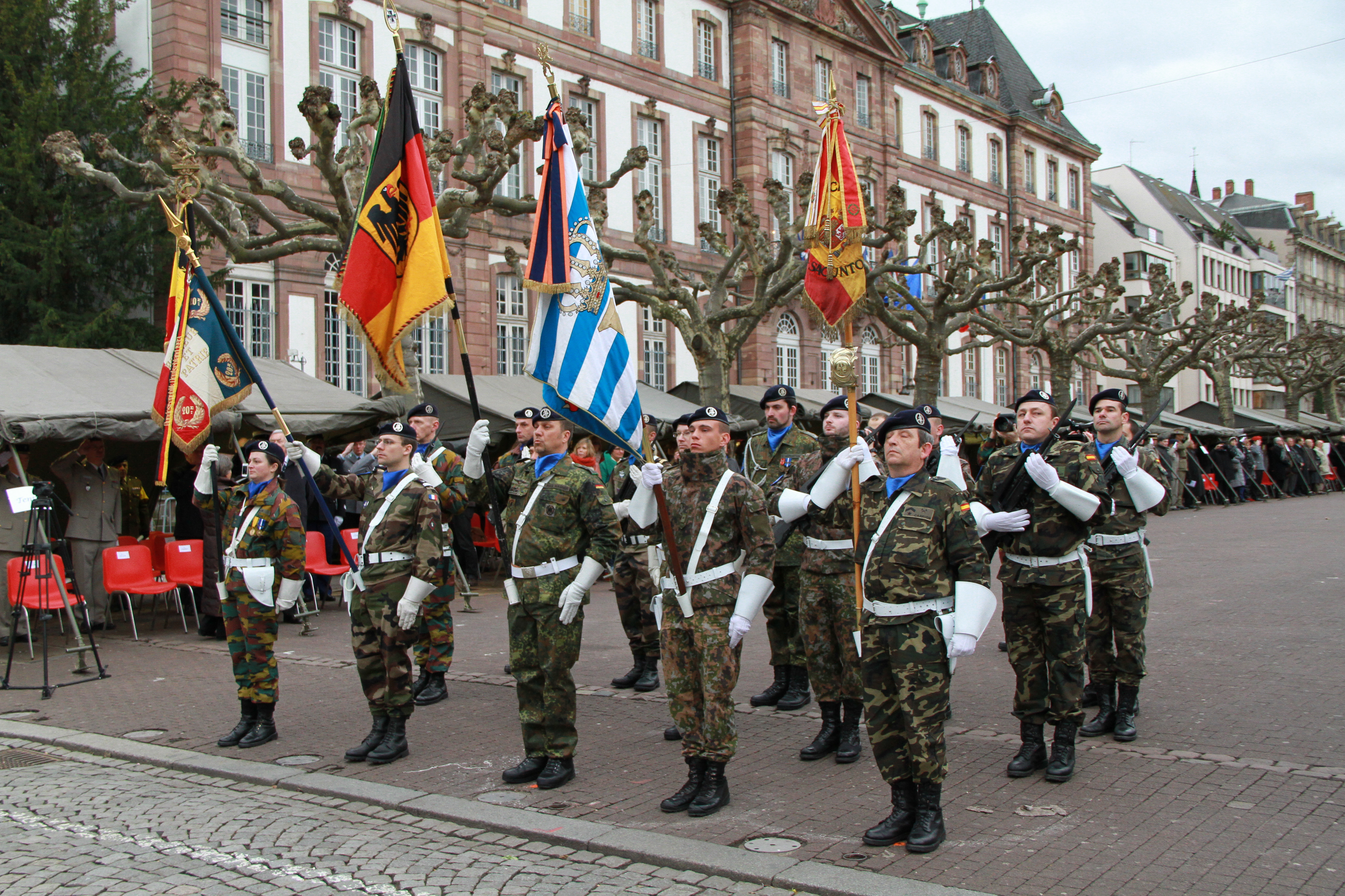 Eurocorps prise d’armes de fin de mission en Afghanistan, place Broglie à Strasbourg 31 janvier 2013, en présence de M. Pieter De Crem, ministre belge de la Défense, et de M. Kader Arif, ministre délégué auprès du ministre de la Défense, chargé des Anciens Combattants.